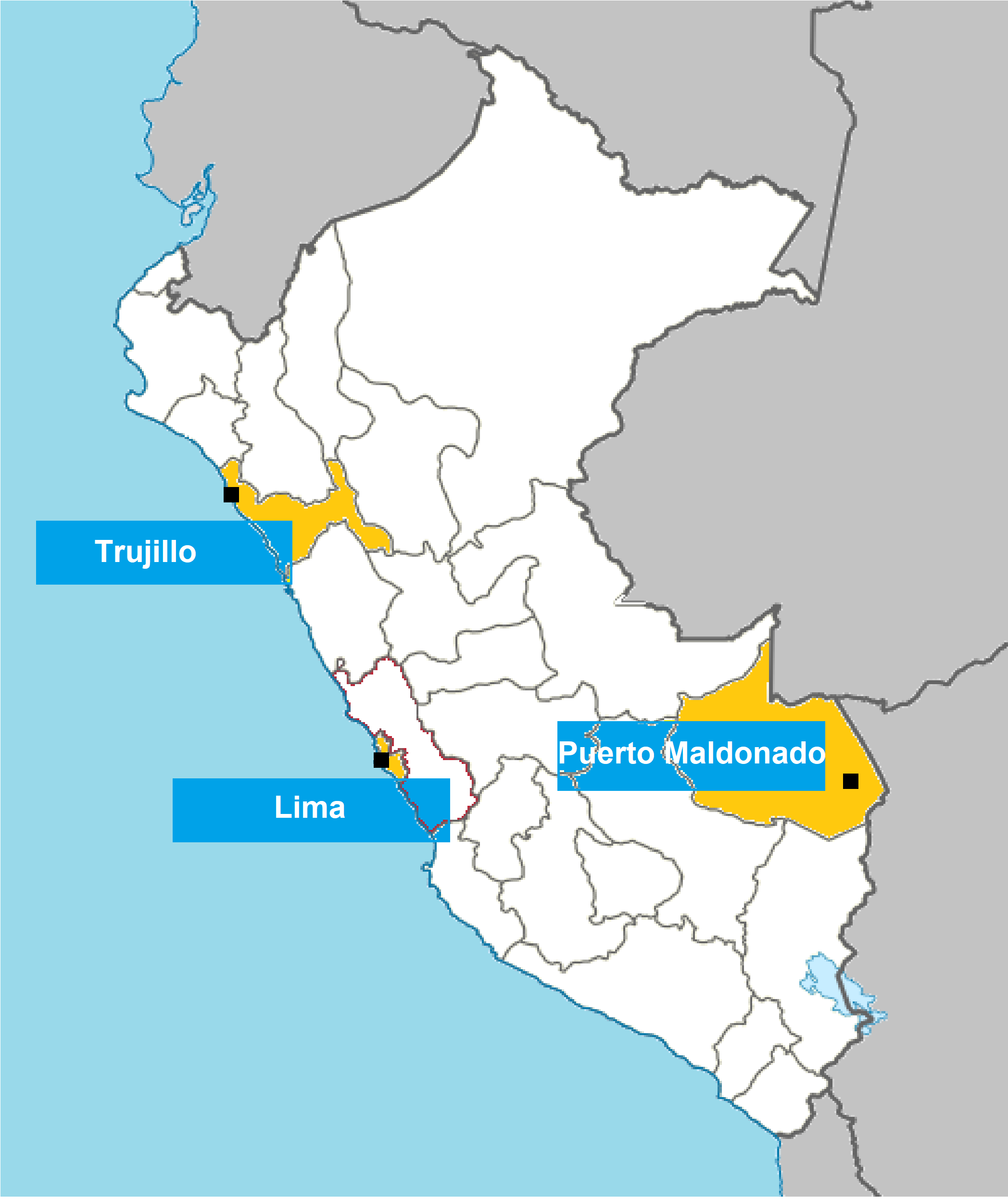 Lugares de visita de Francisco a Perú en enero de 2018